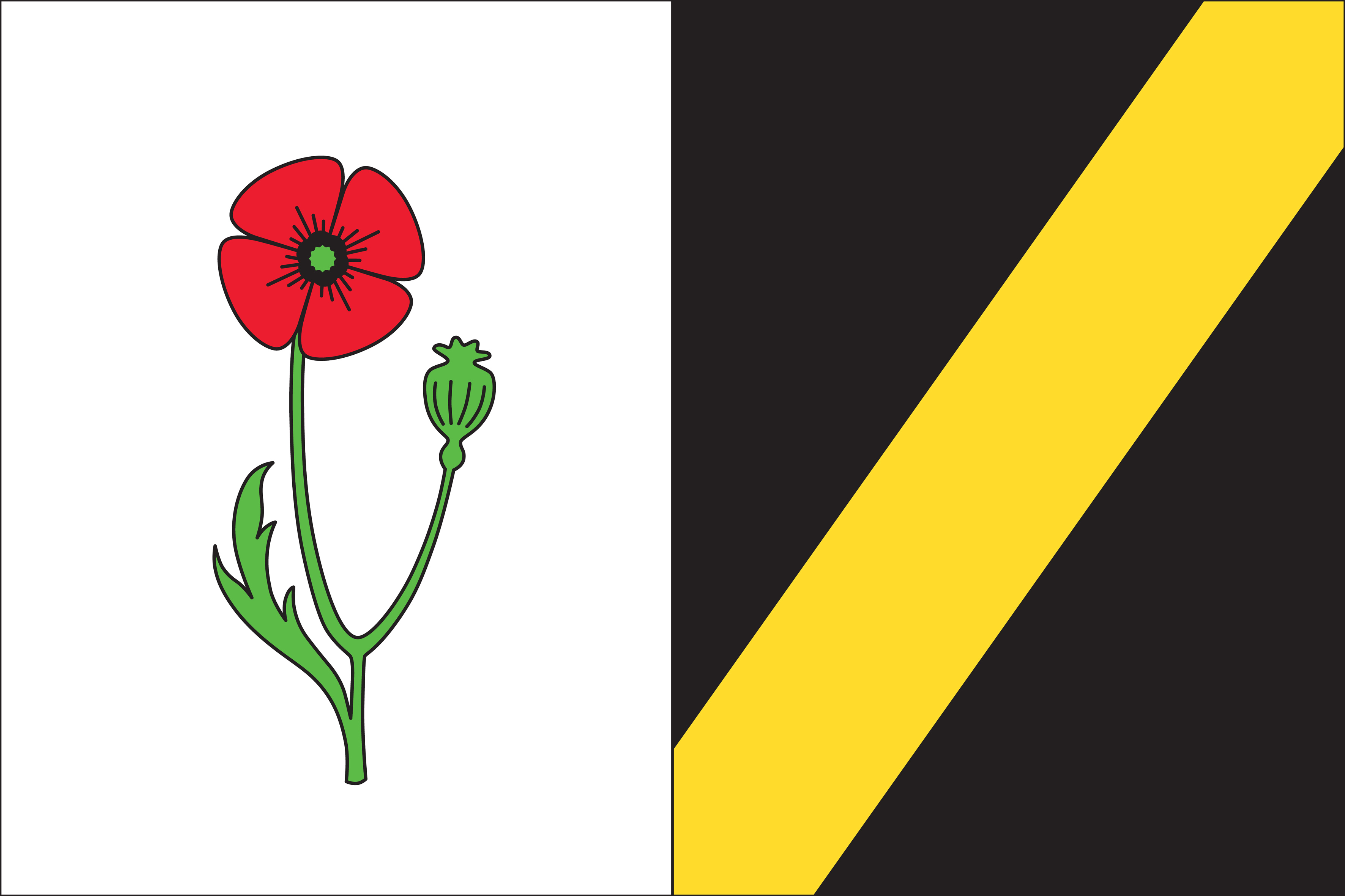 Útěchovice vlajka